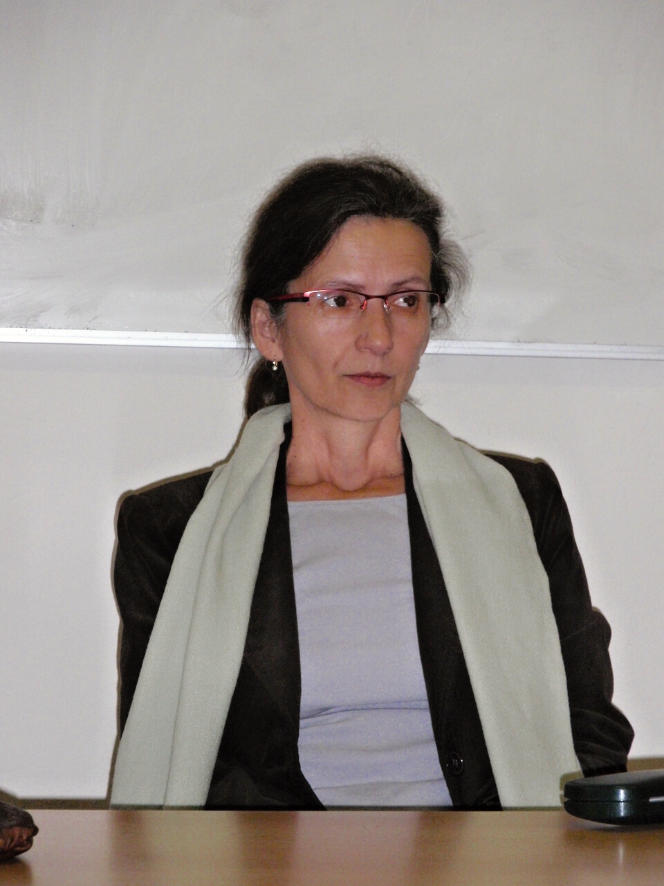 Anna Zonová na Katedře Bohemistiky v Olomouci